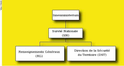 Nachrichtendienste unter Innenministerium GNU-FDL